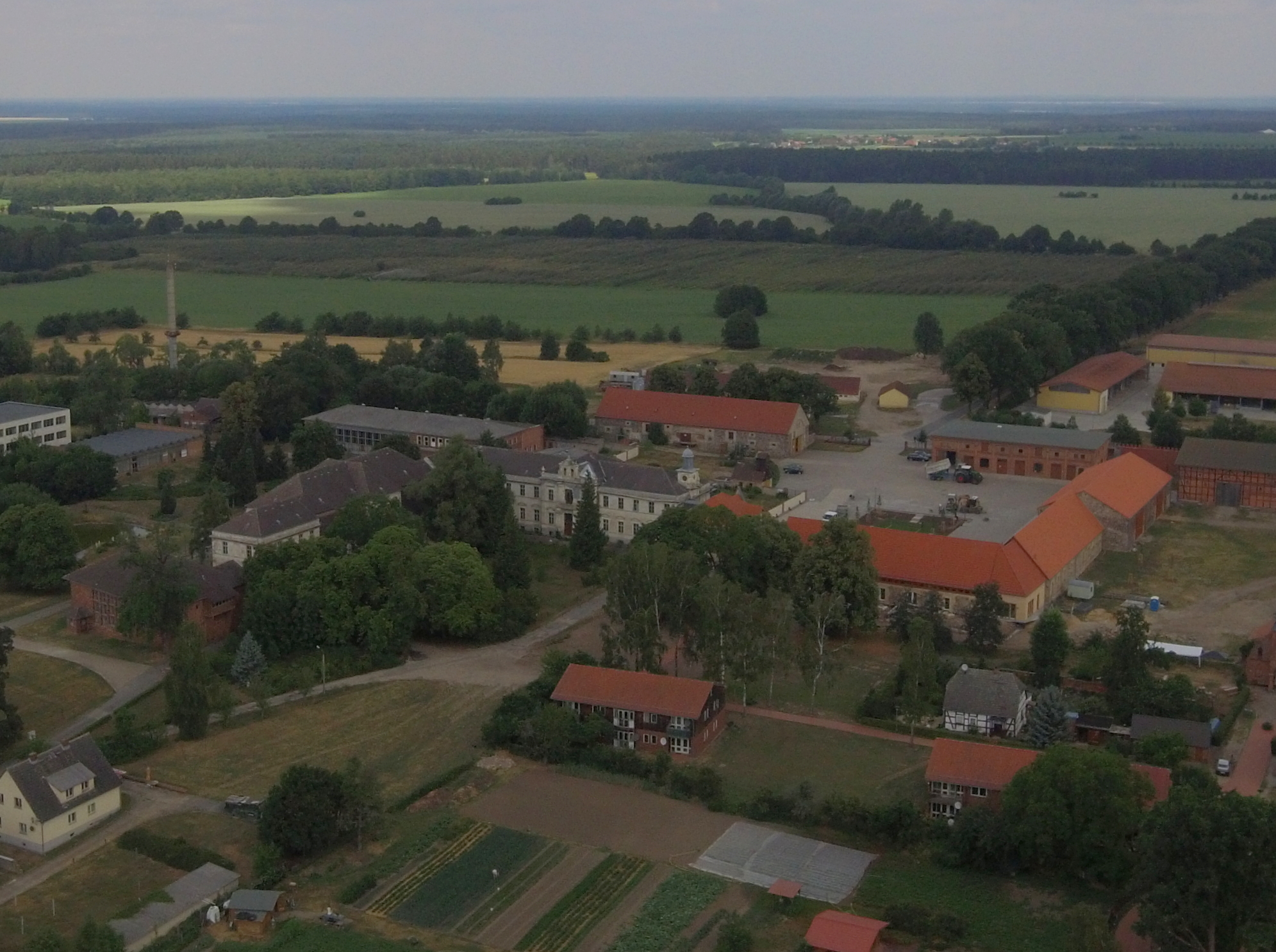 Gut Schmerwitz